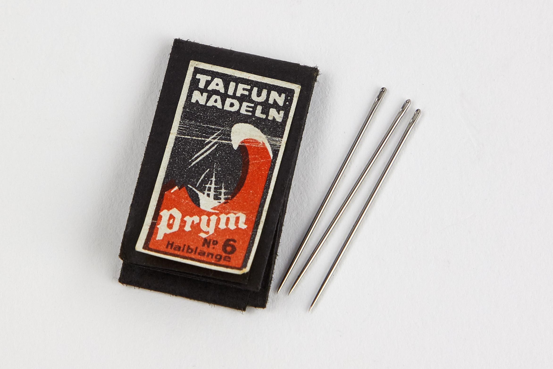 Prym Taifun-Nadeln No 6 halblange